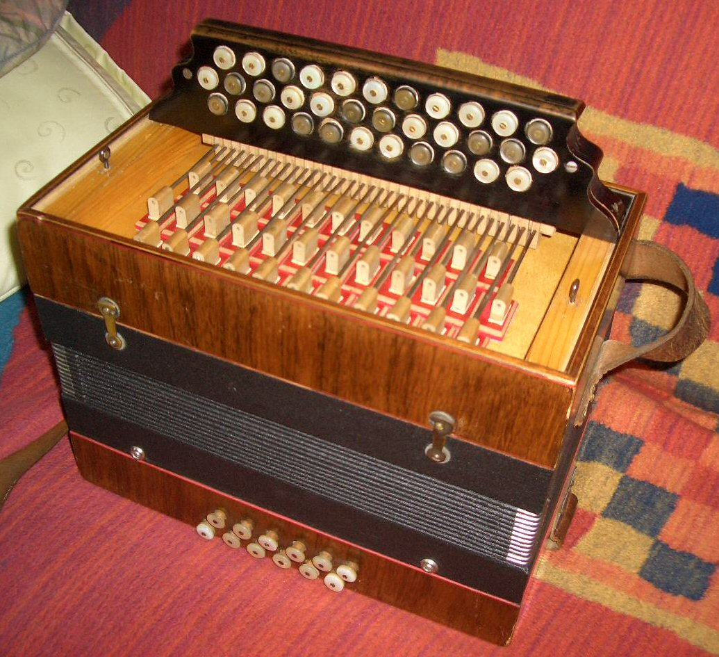 Wiener Modell gebaut von Fa. Hochholzer Verdeck offen